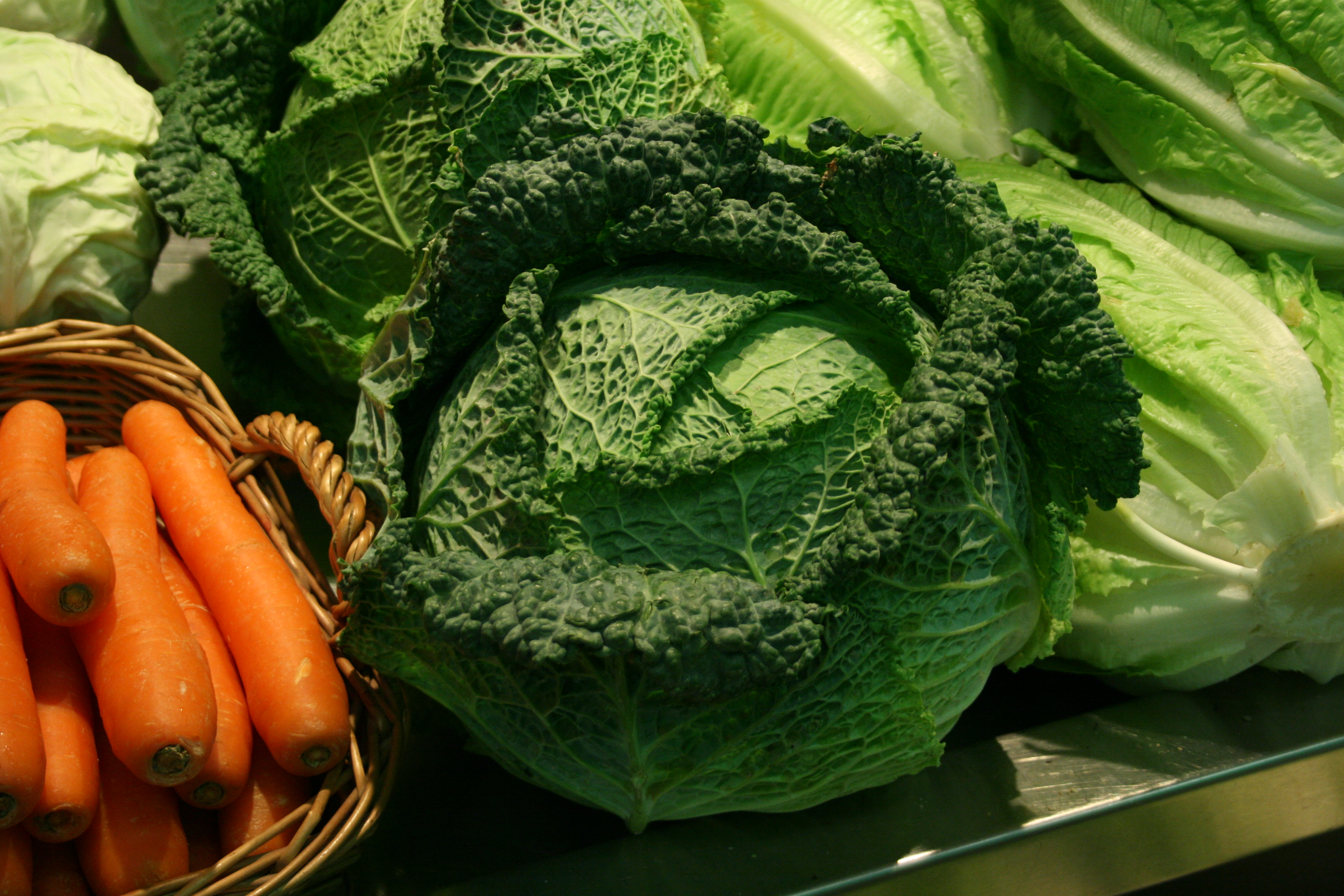 col de Saboya (o col de Milán), zanahorias y lechuga.